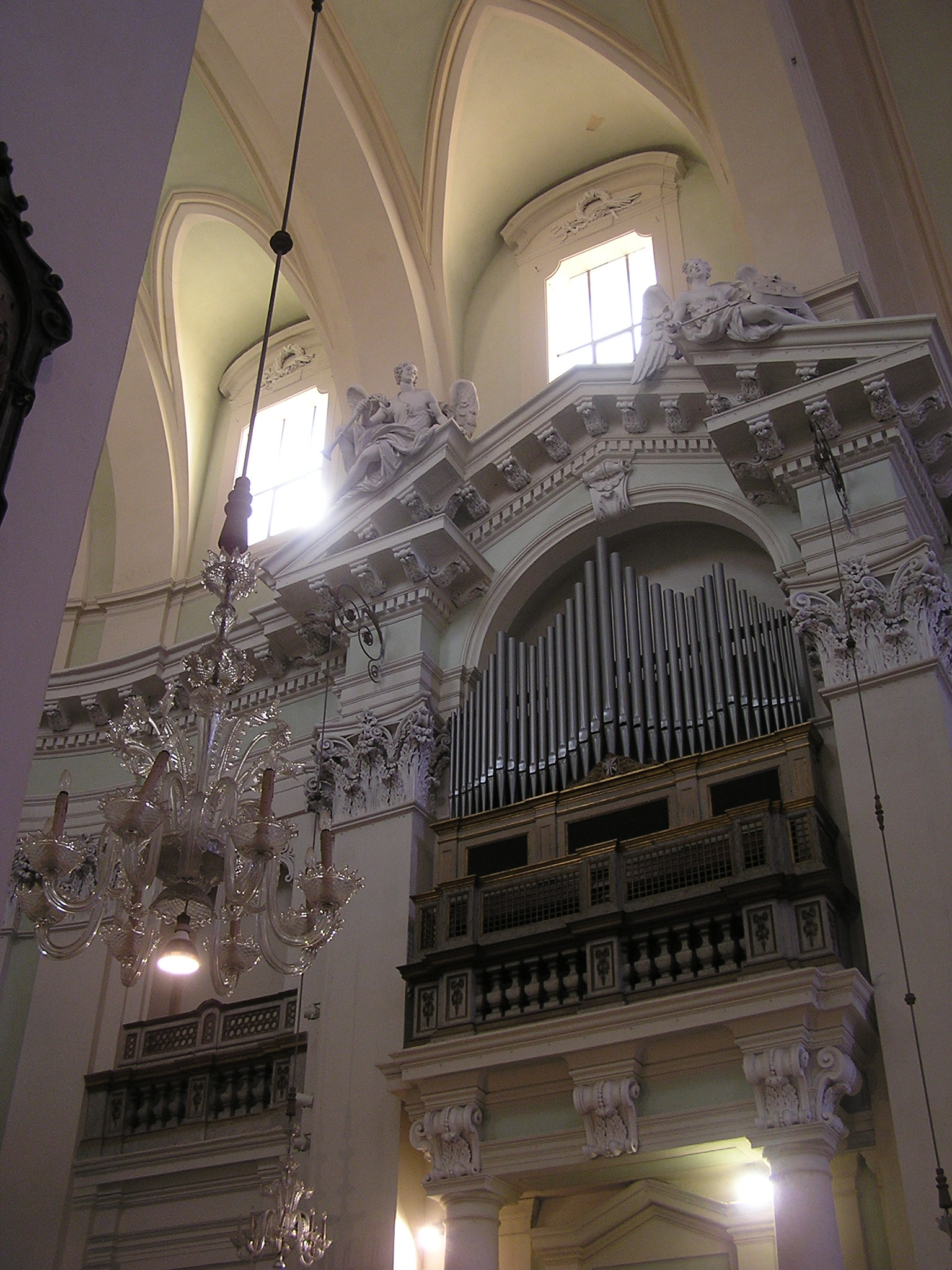 Ancona - Chiesa di San Domenico - organo e angeli musicanti